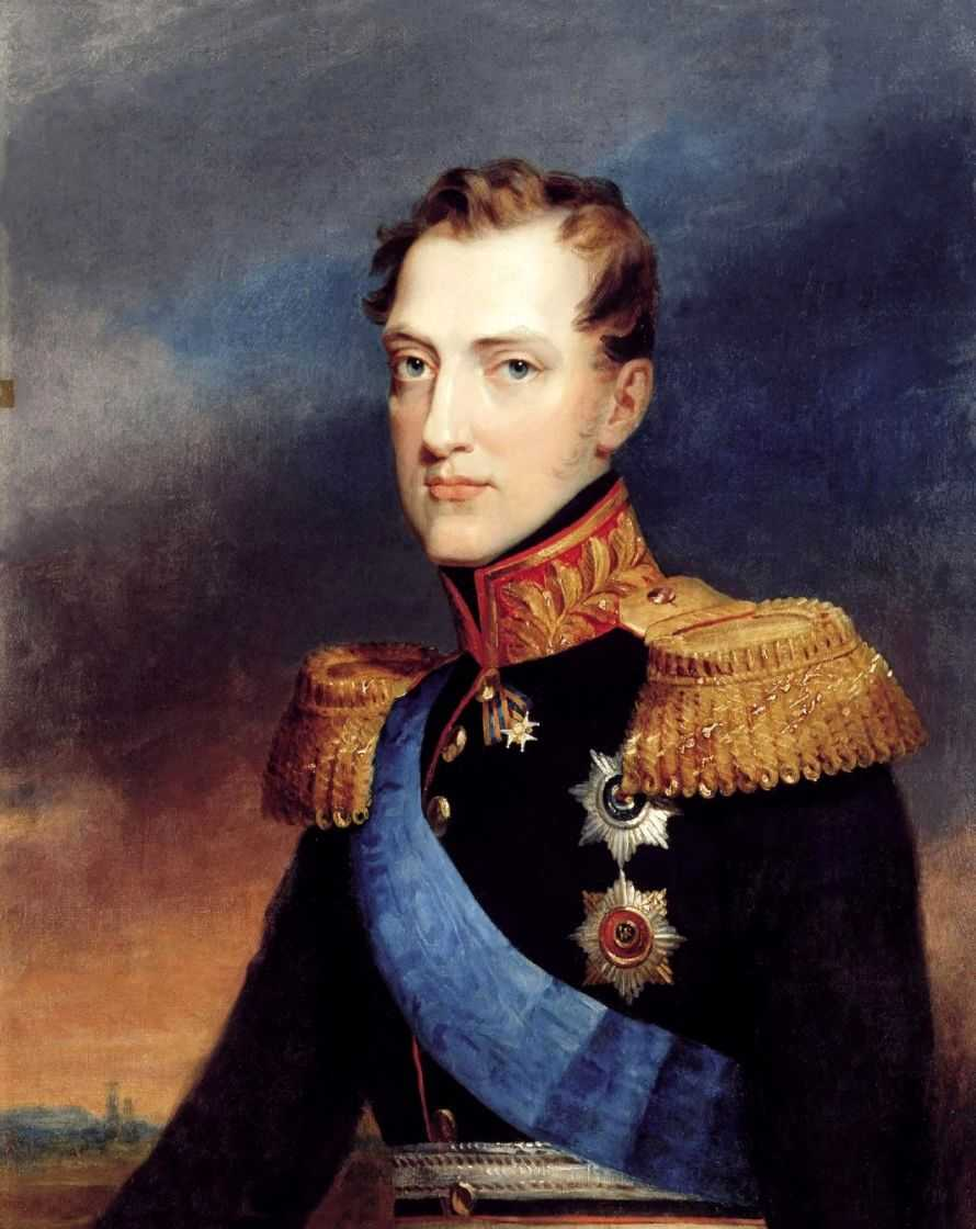 Портрет великого князя Николая Павловича.